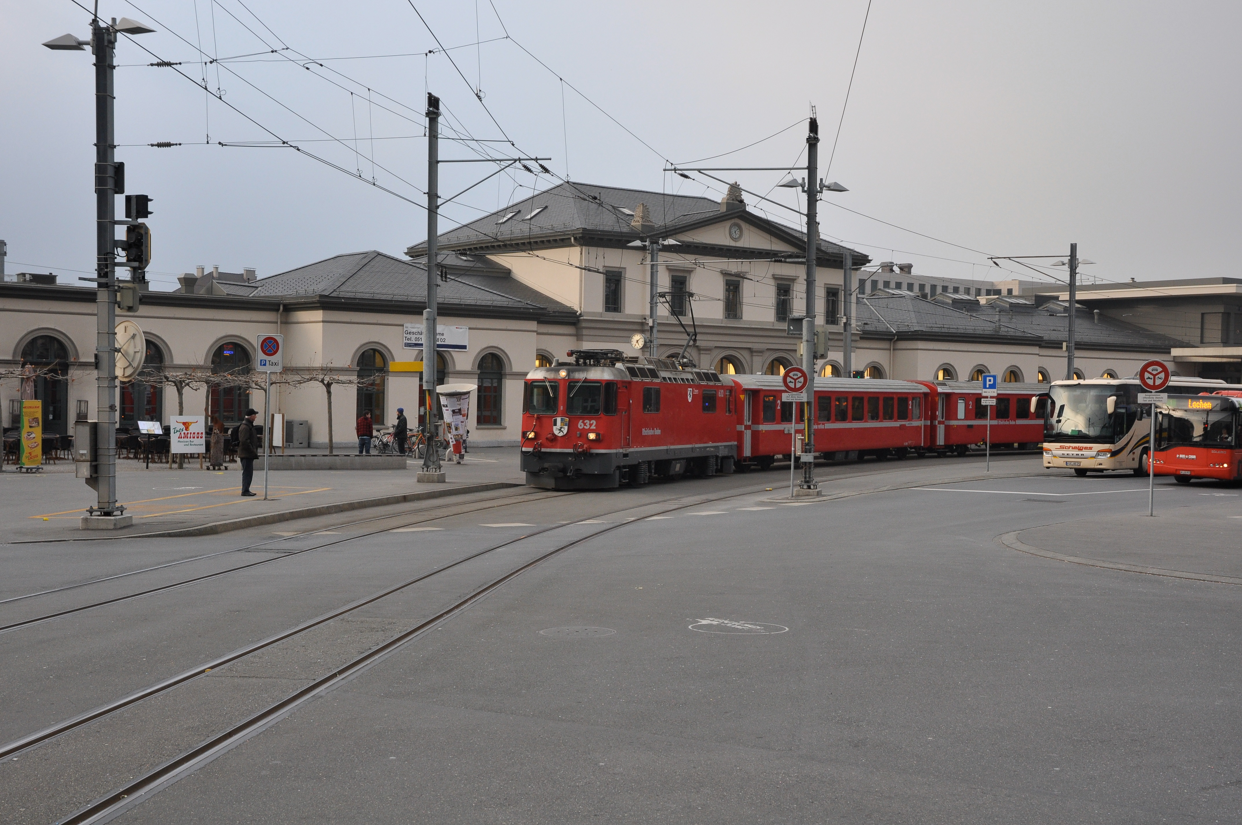 Chur Bahnhofsgebäude, abfahrender Zug nach Arosa mit Ge 4/4II 632